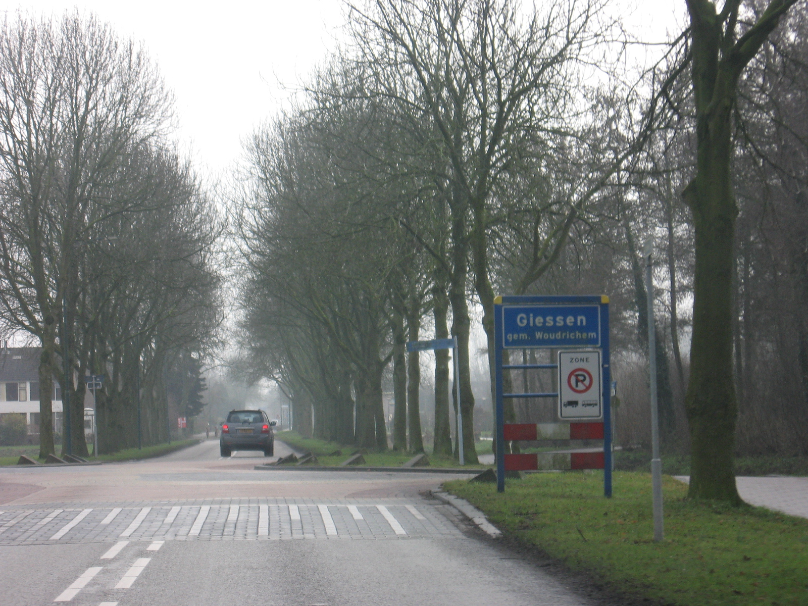 Giessen